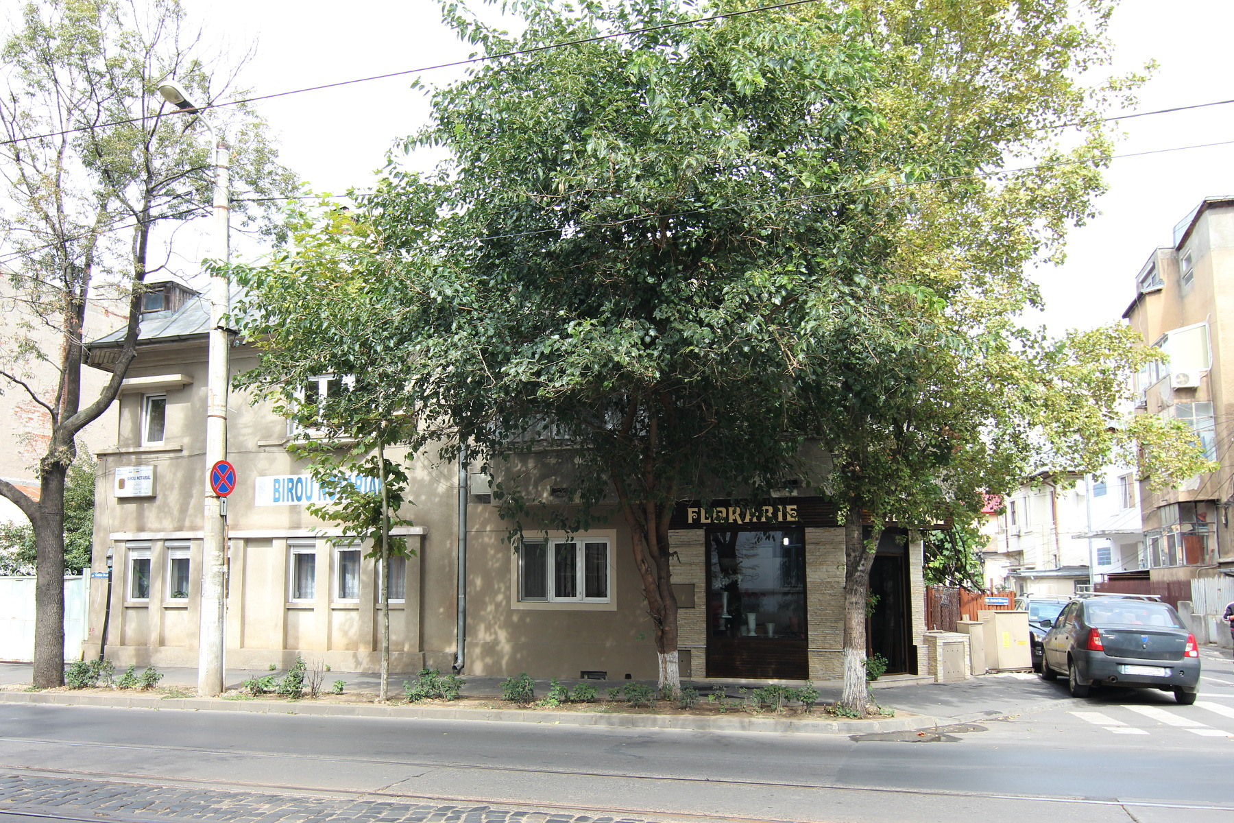 Casă pe Dudești